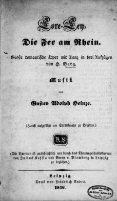 Gustav Adolph Heinze Lore-Ley Die Fee am Rhein Partitur 1846 Druck Friedrich Andrae Leipzig